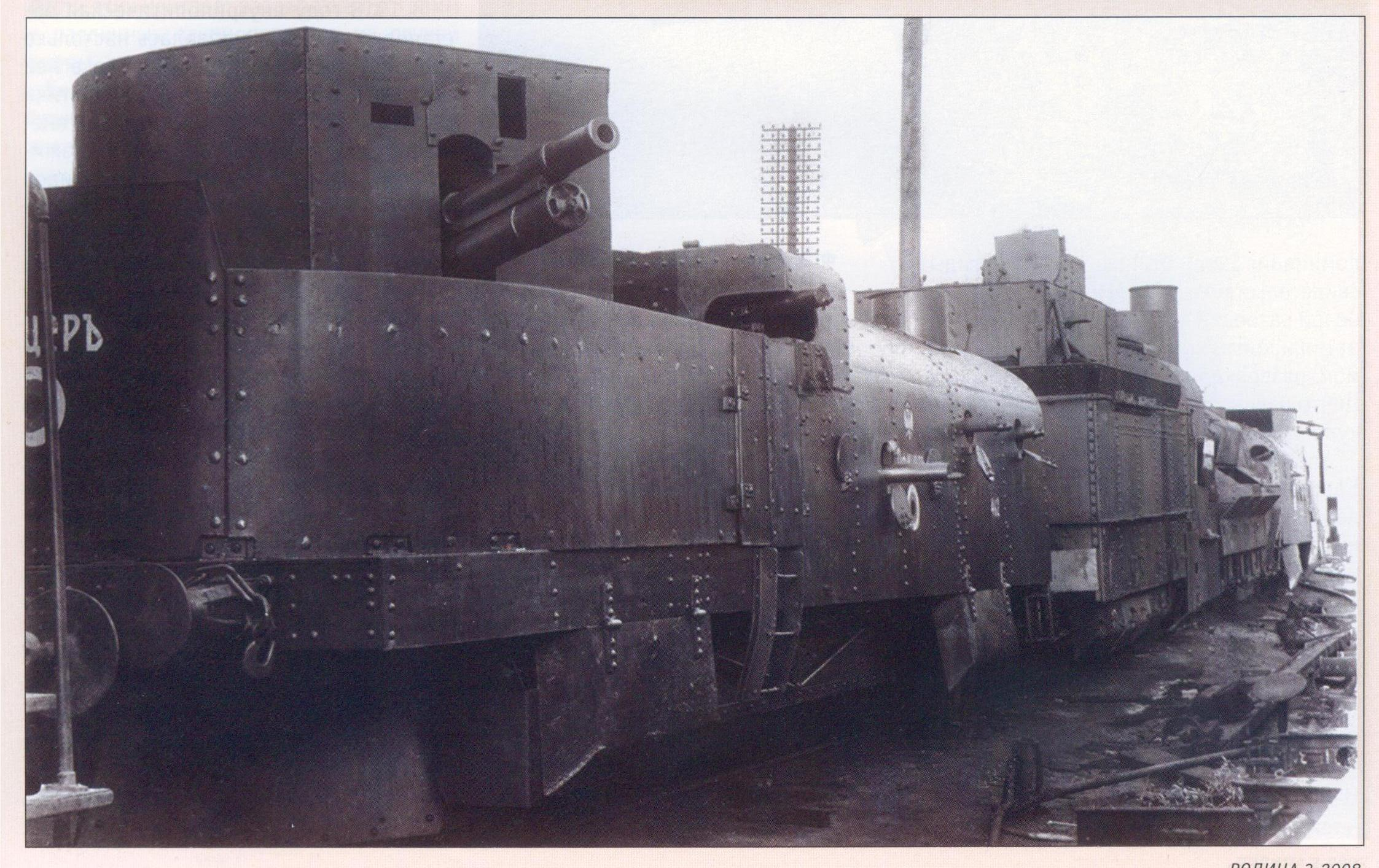 Белый бронепоезд «Офицер». 1919 год. Перед отправкой на фронт из Ростова-на-Дону. Пропагандистская фотография ВСЮР.